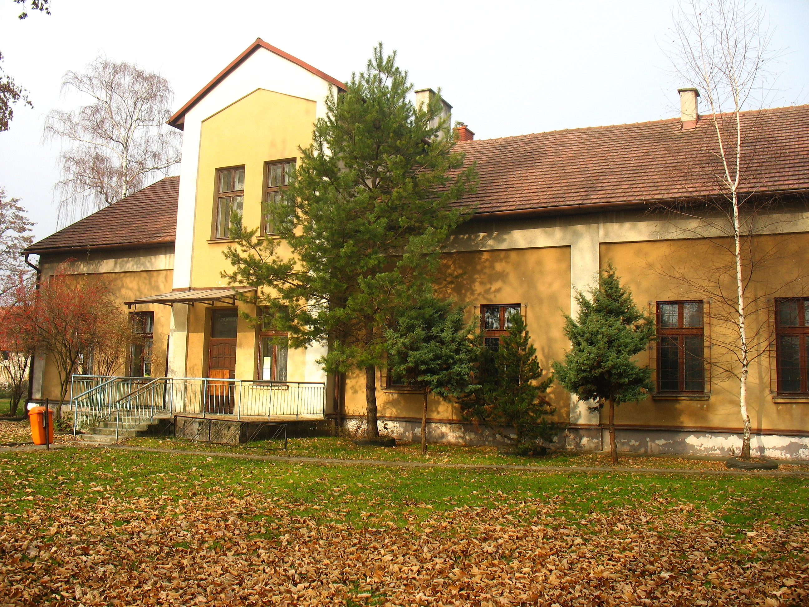 Dworek w Nowej Wsi